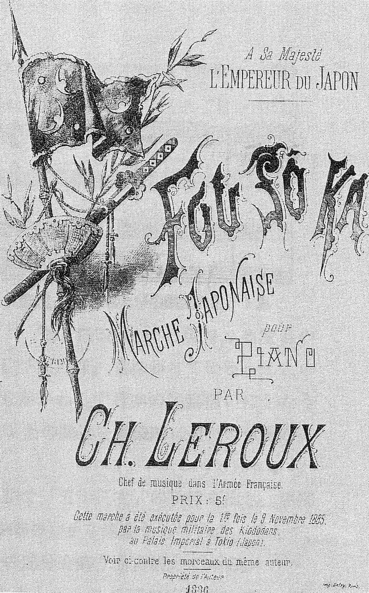 「扶桑歌」ピアノ奏曲表紙